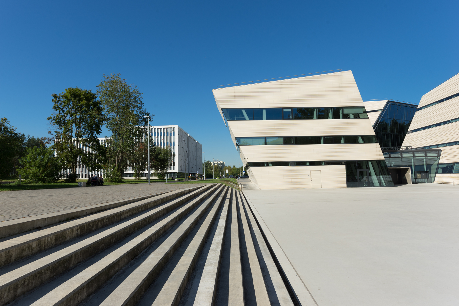 Vilniaus universiteto Mokslinės komunikacijos ir informacijos centras studentams atviras visą parą.